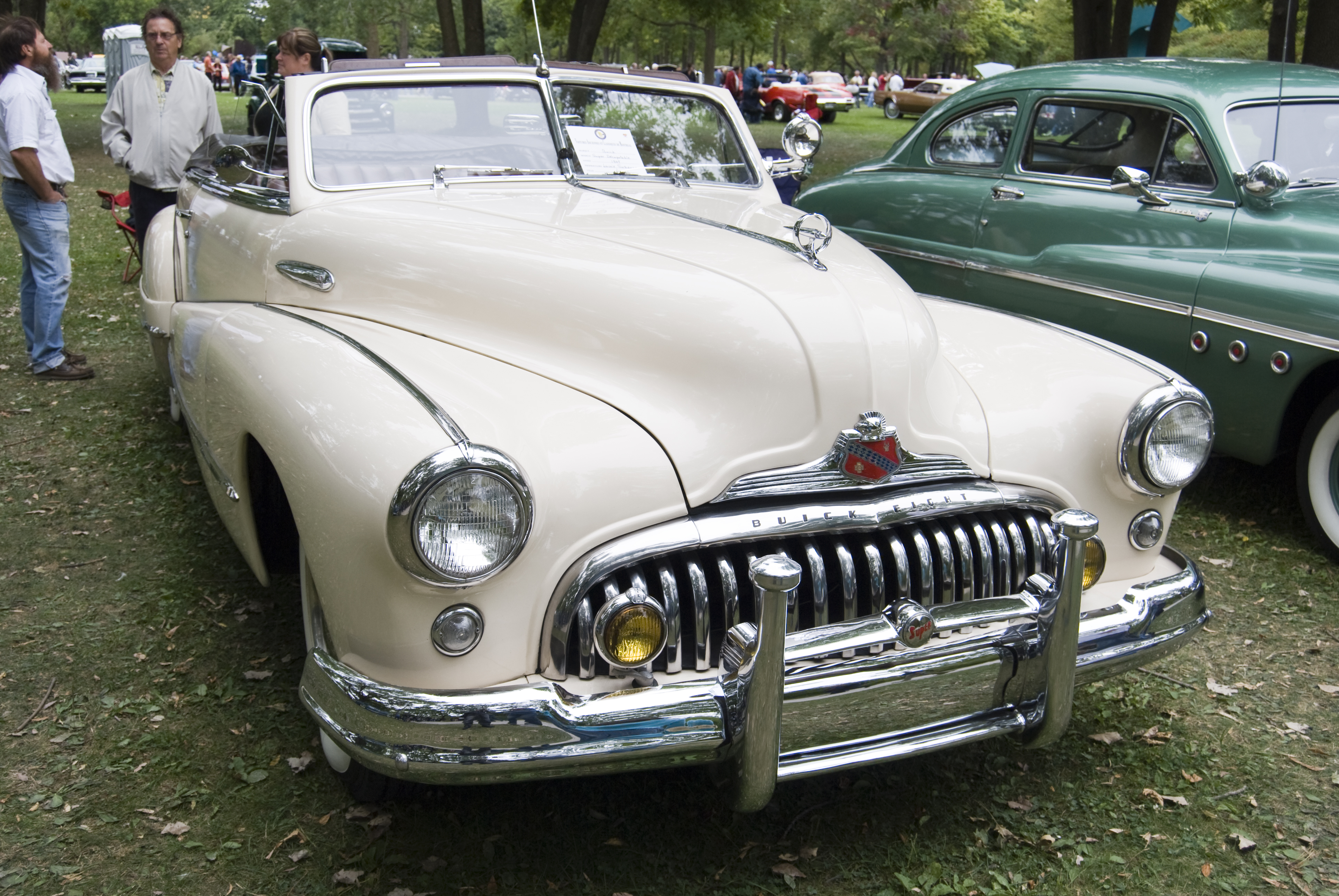 1948 Buick Super Series 50 Model 56C 2-door Convertible